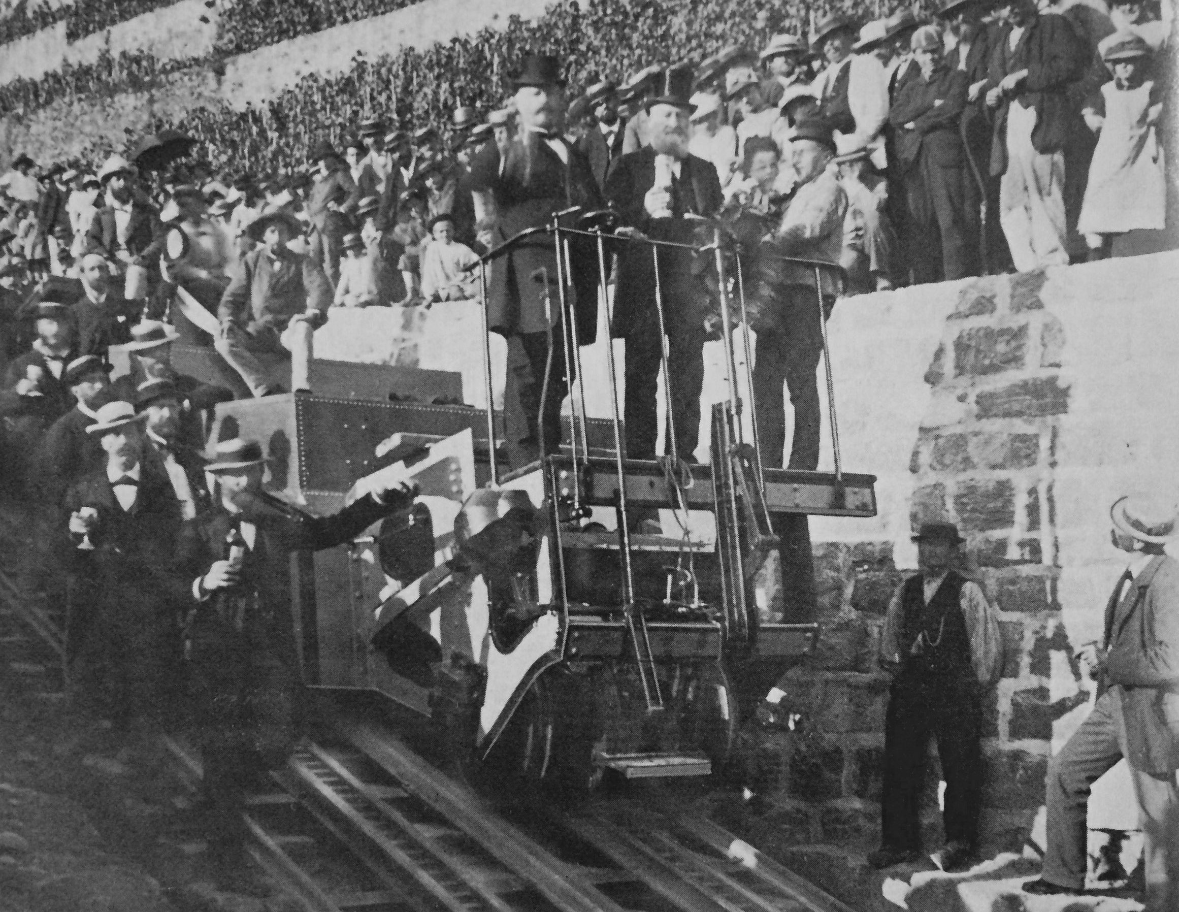 Ankunft der Probefahrt mit einem Wagen-Untergestell ohne Seil der Talstation der Seilbahn Territet-Glion. Die Probefahrt sollte die Tauglichkeit der Betriebsbremse nachweisen und war efolgreich. Niklaus Riggenbach steht auf der Plattform des Untergestells.